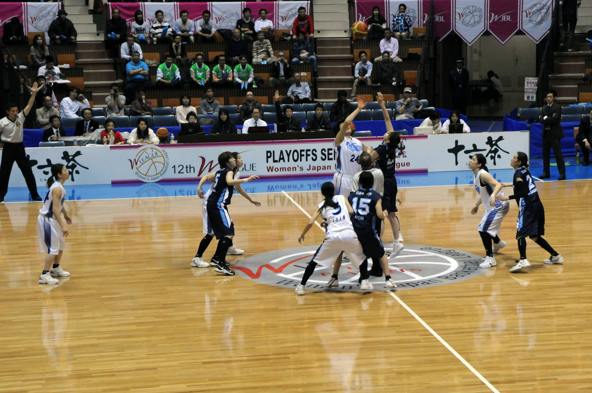 WJBL 10-11入れ替え戦、三菱対日立ハイテク。代々木第二体育館で。